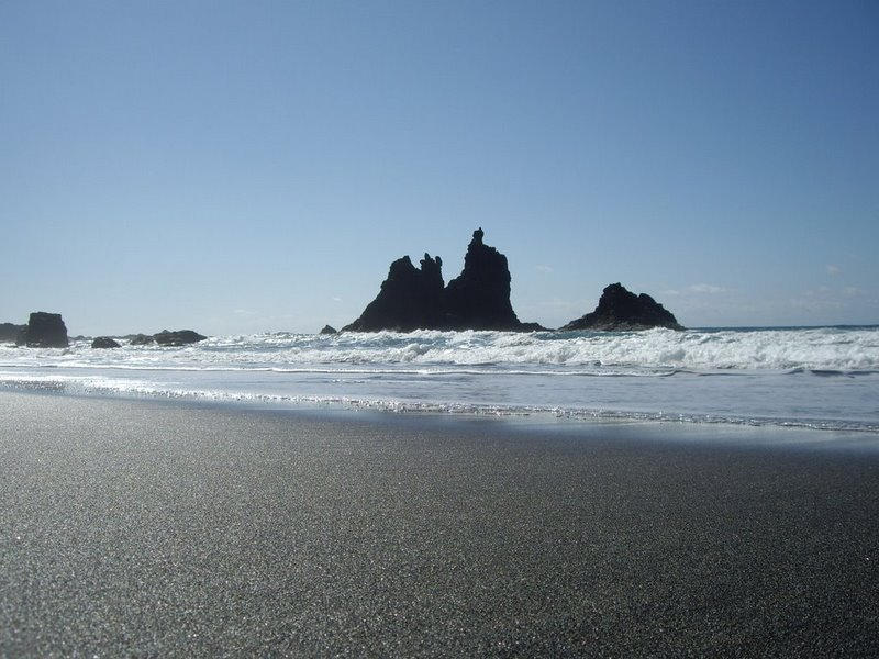 Playa de Benijo (Santa Cruz de Tenerife)